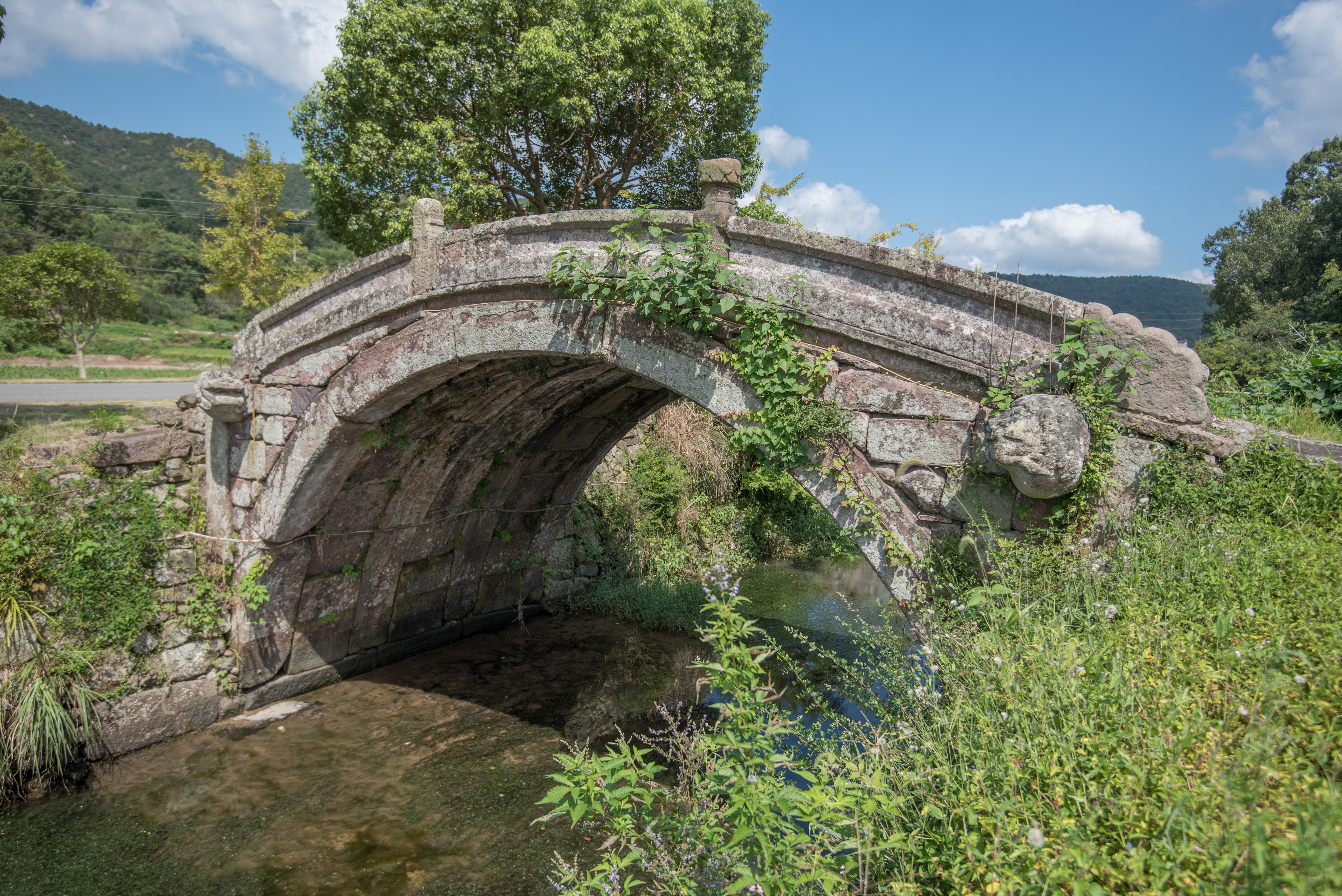 西岙石拱桥——惠德桥